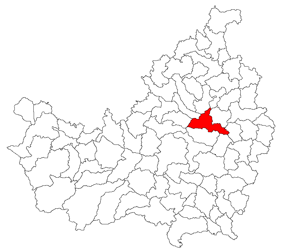 Categorie:Hărţi ale judeţului Cluj